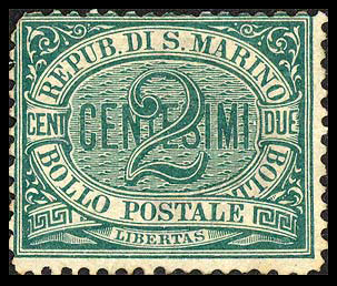 Первая почтовая марка Сан-Марино